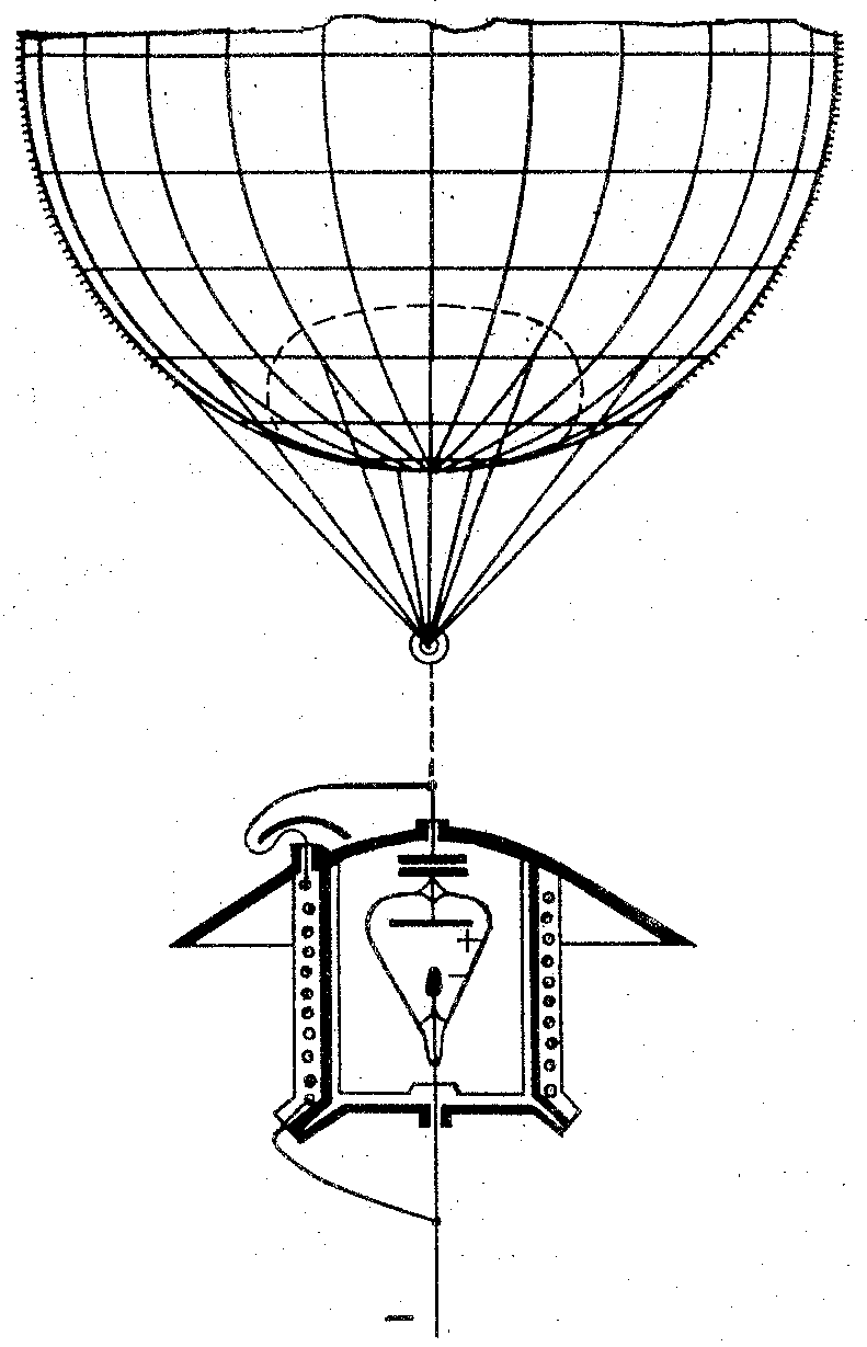 Plauson Node